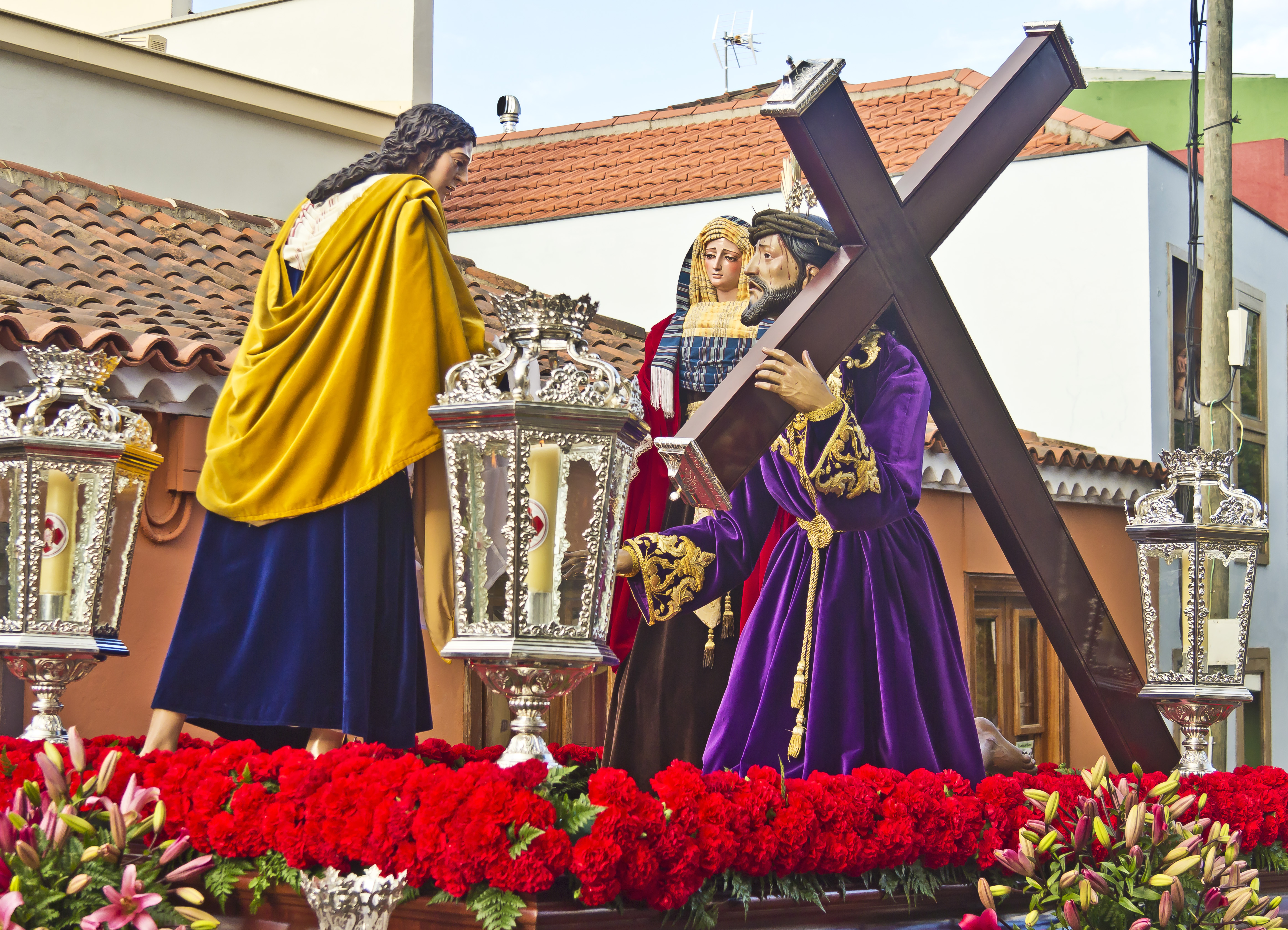 Procesión con las imágines del paso de la Verónica y de la Santa Faz